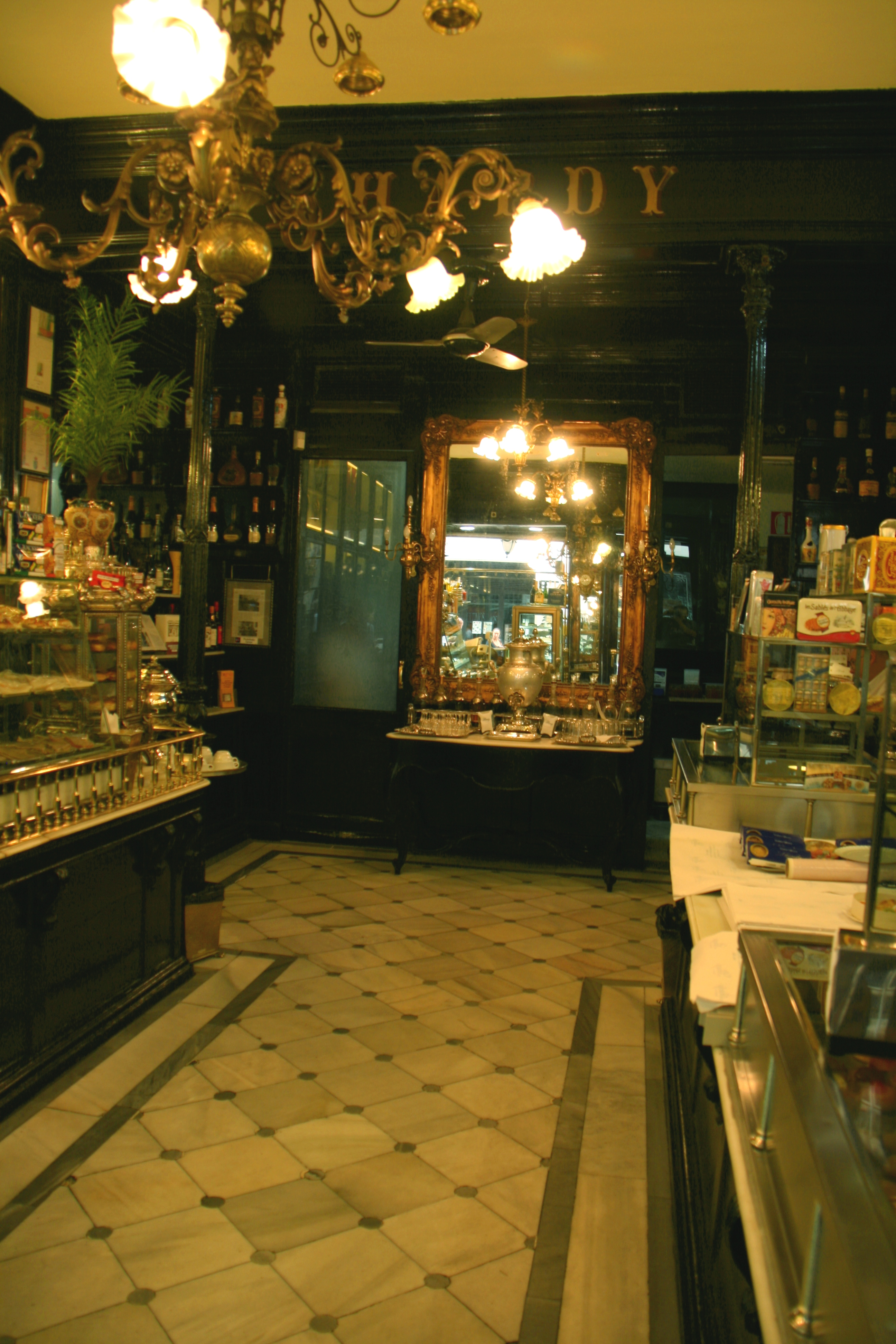 Interior de la tienda Lhardy - Vista del samovar